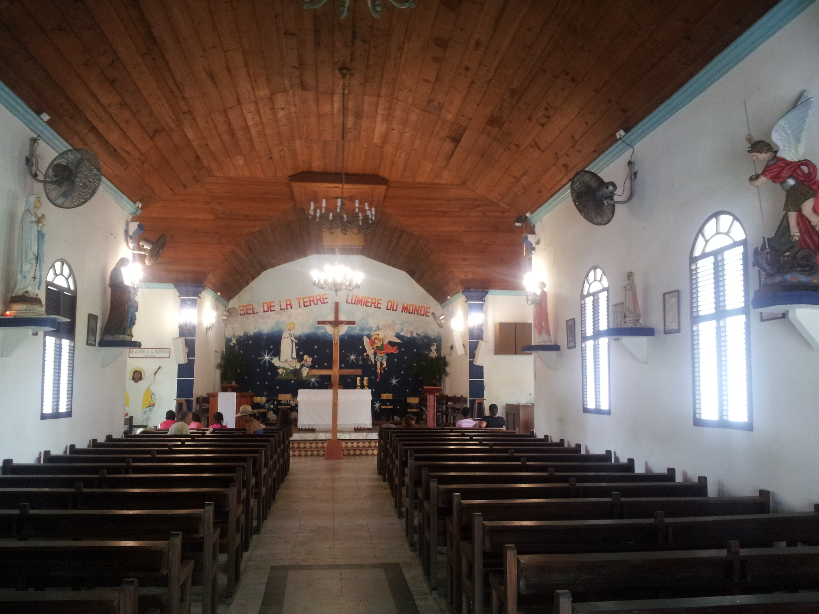 Nef de l'église Notre-Dame de l'Assomption de Terre-de-Haut